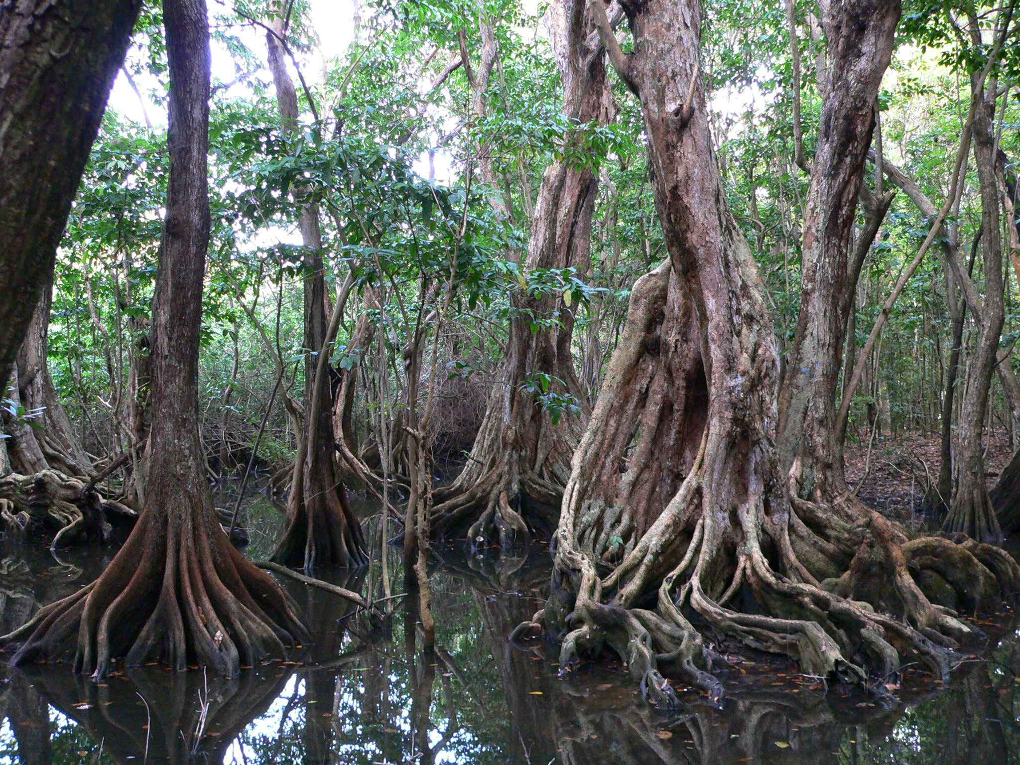 Pterocarpus officinalis dans la forêt du littoral marécageuse, à Deshaie, Guadeloupe, Antilles